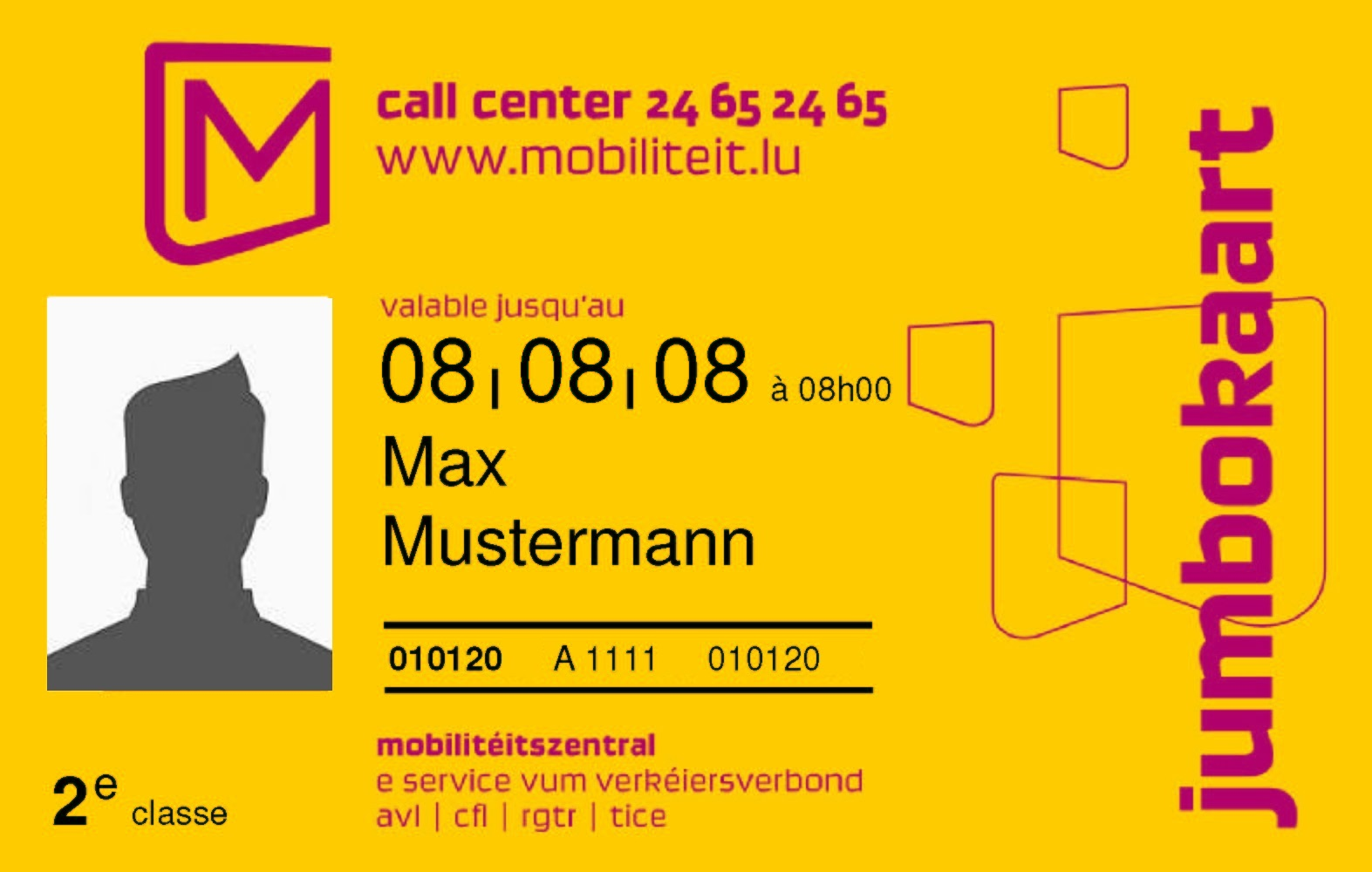 Abonnement annuel pour jeunes gens "Jumbokaart" (modèle 2008)